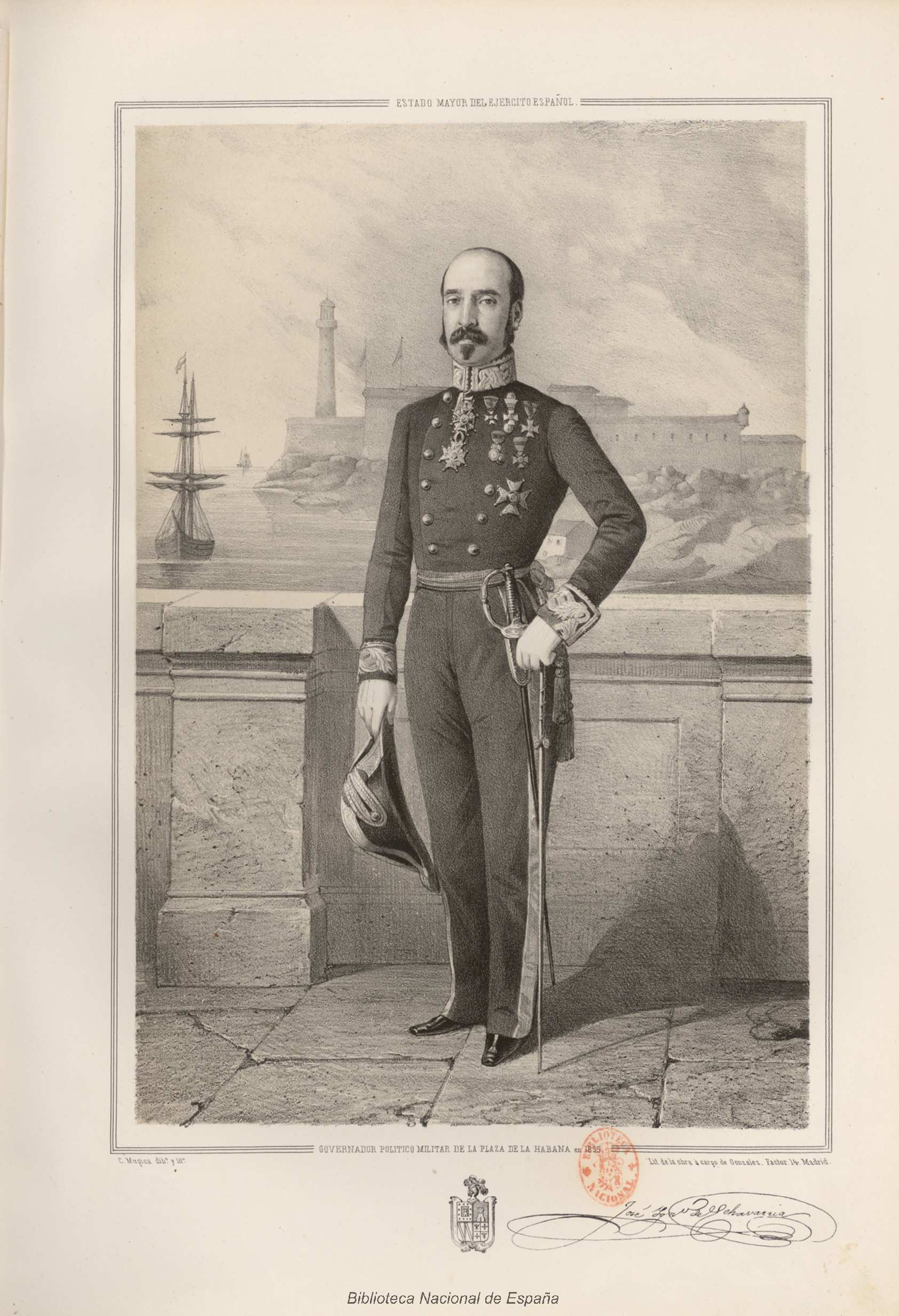 José Ignacio de Echevarría, gobernador político militar de la plaza de La Habana. Dibujo y litografía de Carlos Múgica y Pérez para "Estado Mayor General del Ejército